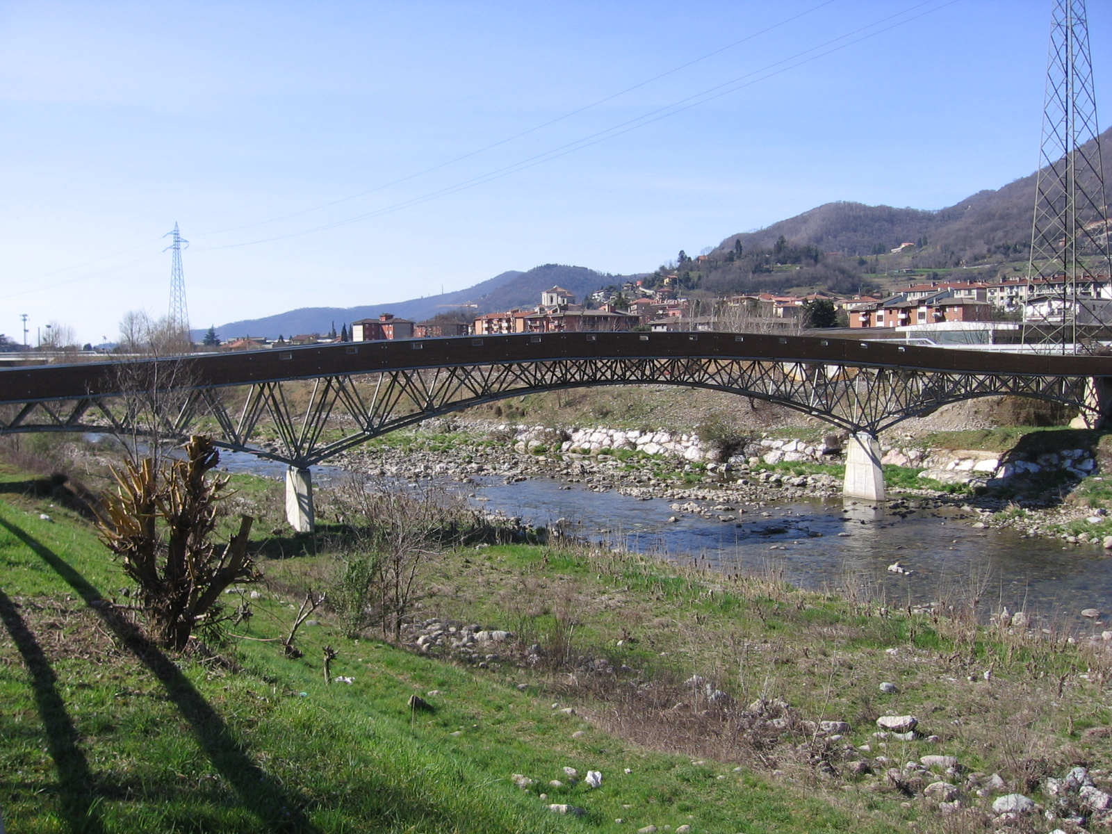 Fiume Serio tra Pradalunga e Nembro, Bergamo, Italy